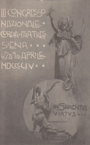 Carte-postale annonçant le Congrès national de la Corda Fratres 1904.